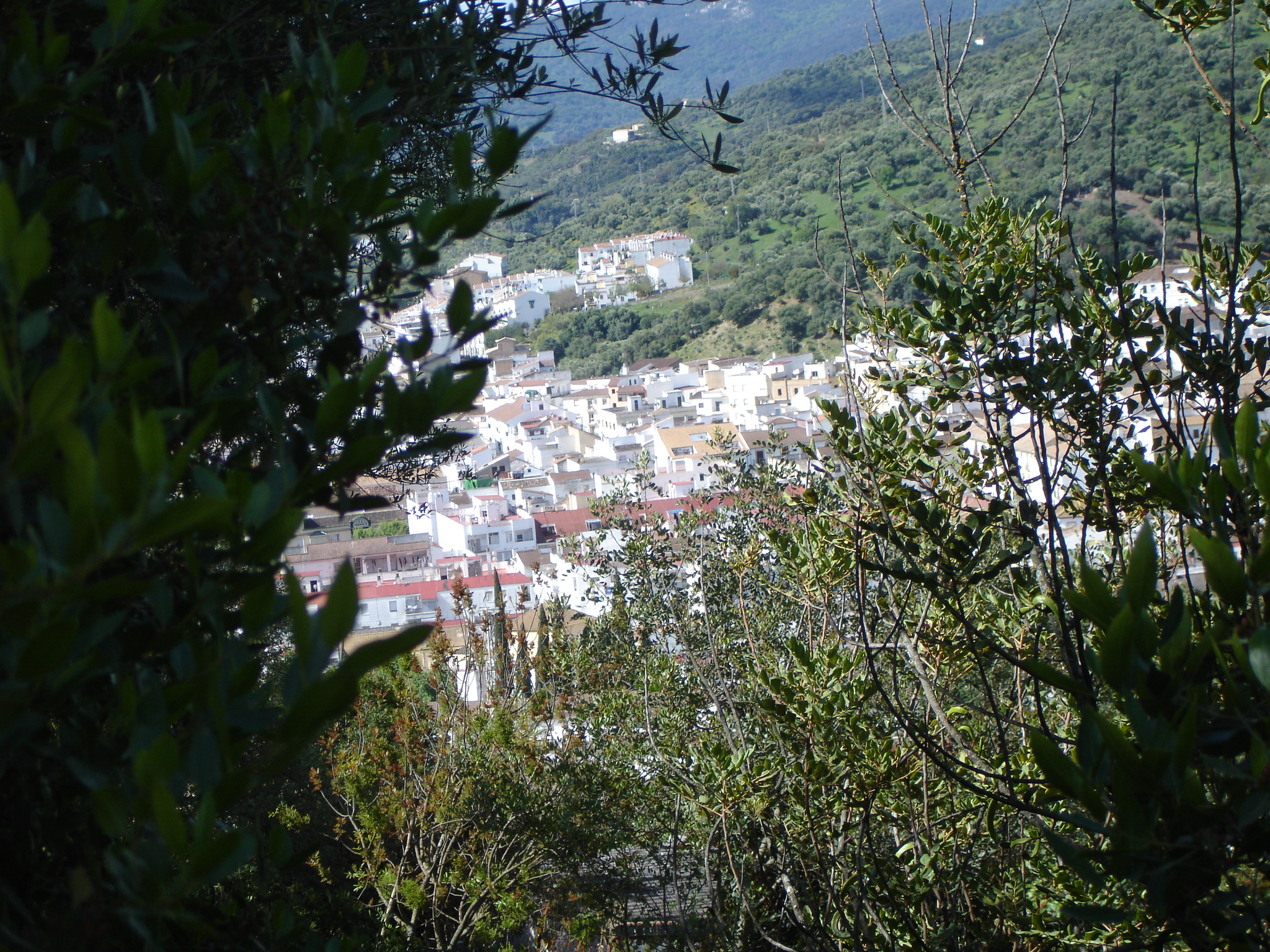 Vista parcial de Ubrique desde la calzada romana